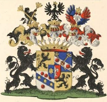 Sieversi suguvõsa krahvivapp (Püha Rooma)